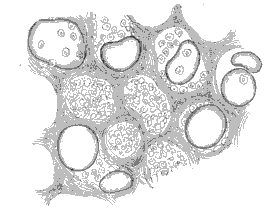 Aus : Handbuch der Gewebelehre des Menschen - Seite 480 von Albert Kölliker, 1867 Originalkommentar: Drüsenblasen der Thyroidea mit Collooid - 50x vergrößert